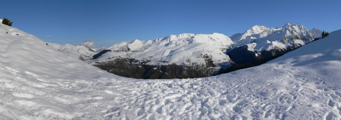 Panorama au col d'Azet (Pyrénées) en direction de la vallée du Louron, du col de Peyresourde, et de la station de Peyragudes. Le Col de Peyresourde est visible au fond à gauche (voir encadré sur la photo).